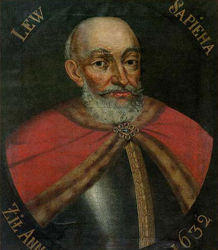 Беларуская (тарашкевіца): Партрэт Льва Сапегі (Leŭ Sapieha)